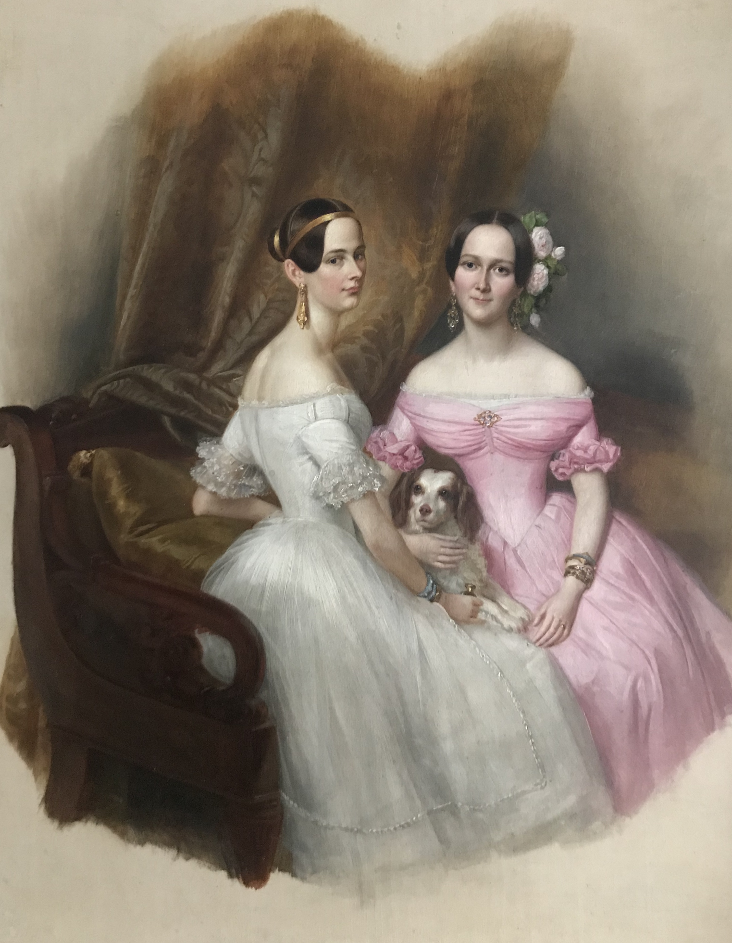 Doppelporträt der Schwestern Elise von Rauch, verheiratete Gräfin von Fersen (1820–1908) und Blanka von Rauch, verheiratete von Schönermark verwitwete Freifrau Spiegel von und zu Peckelsheim (1817–1905) - Ölgemälde von Julius Schoppe, signiert, 1839